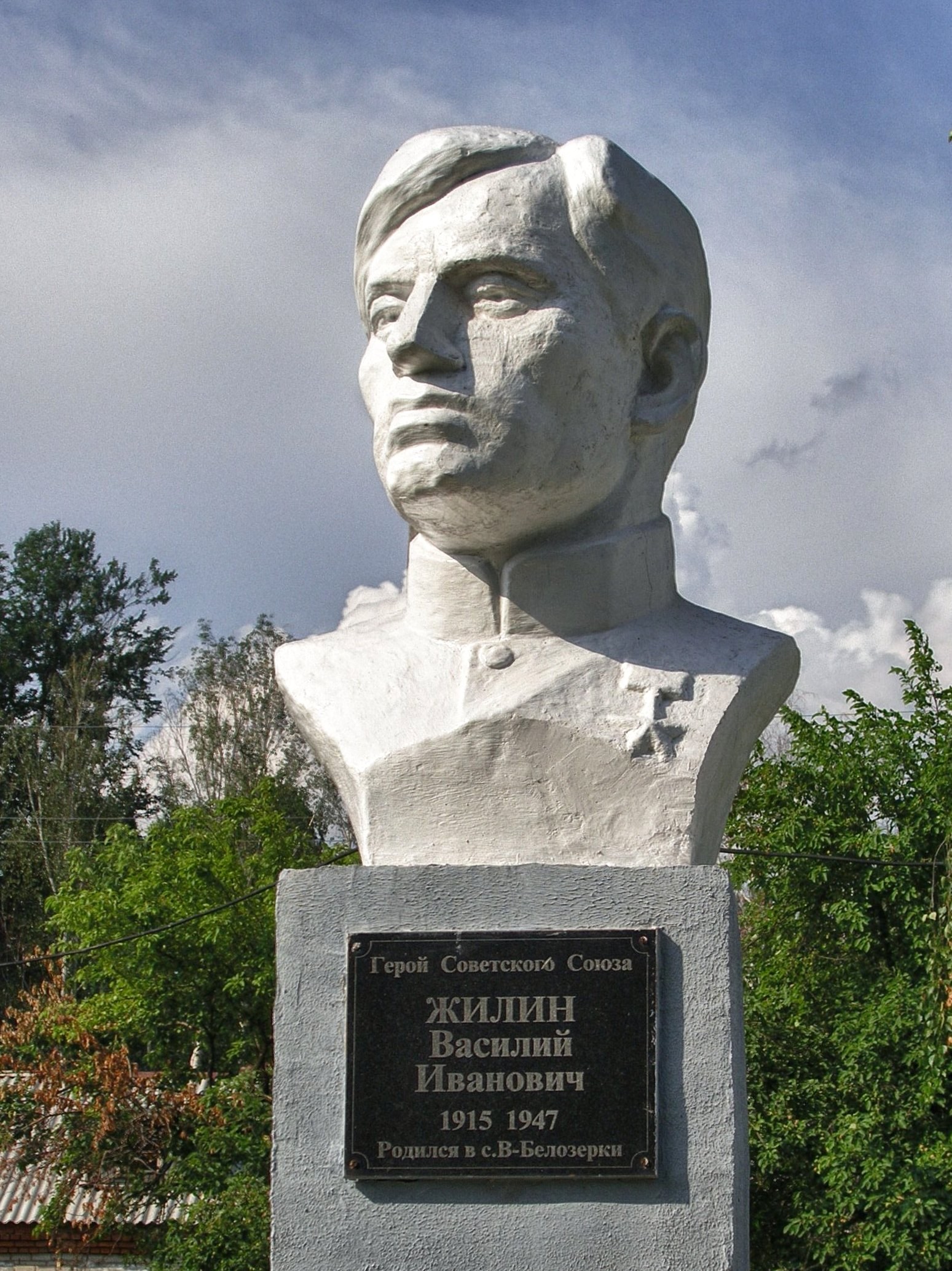 Бюст Герою Советского Союза Василию Жилину, Верхние Белозёрки, Ставропольский район, Самарская область, Россия